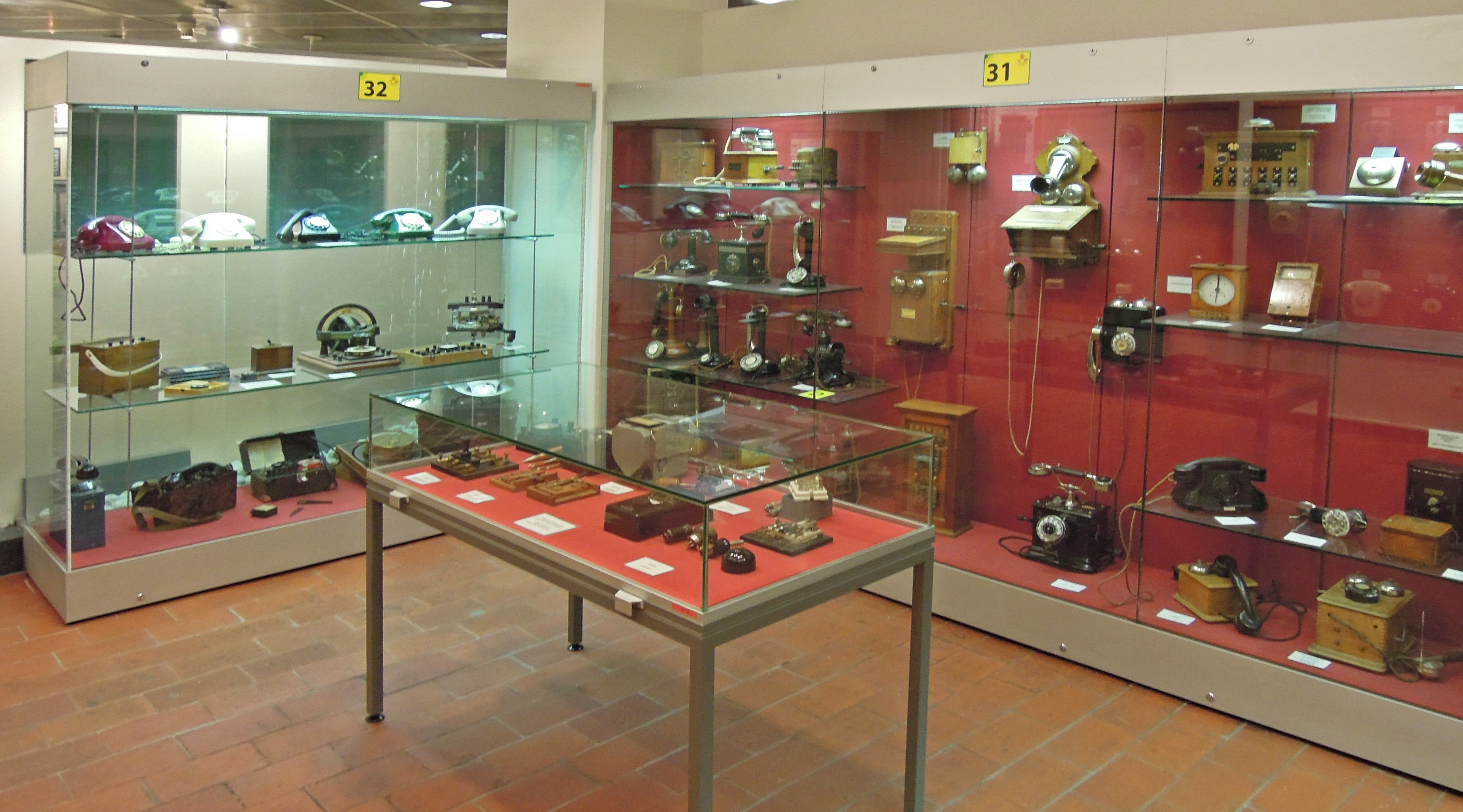 Ausstellungsraum